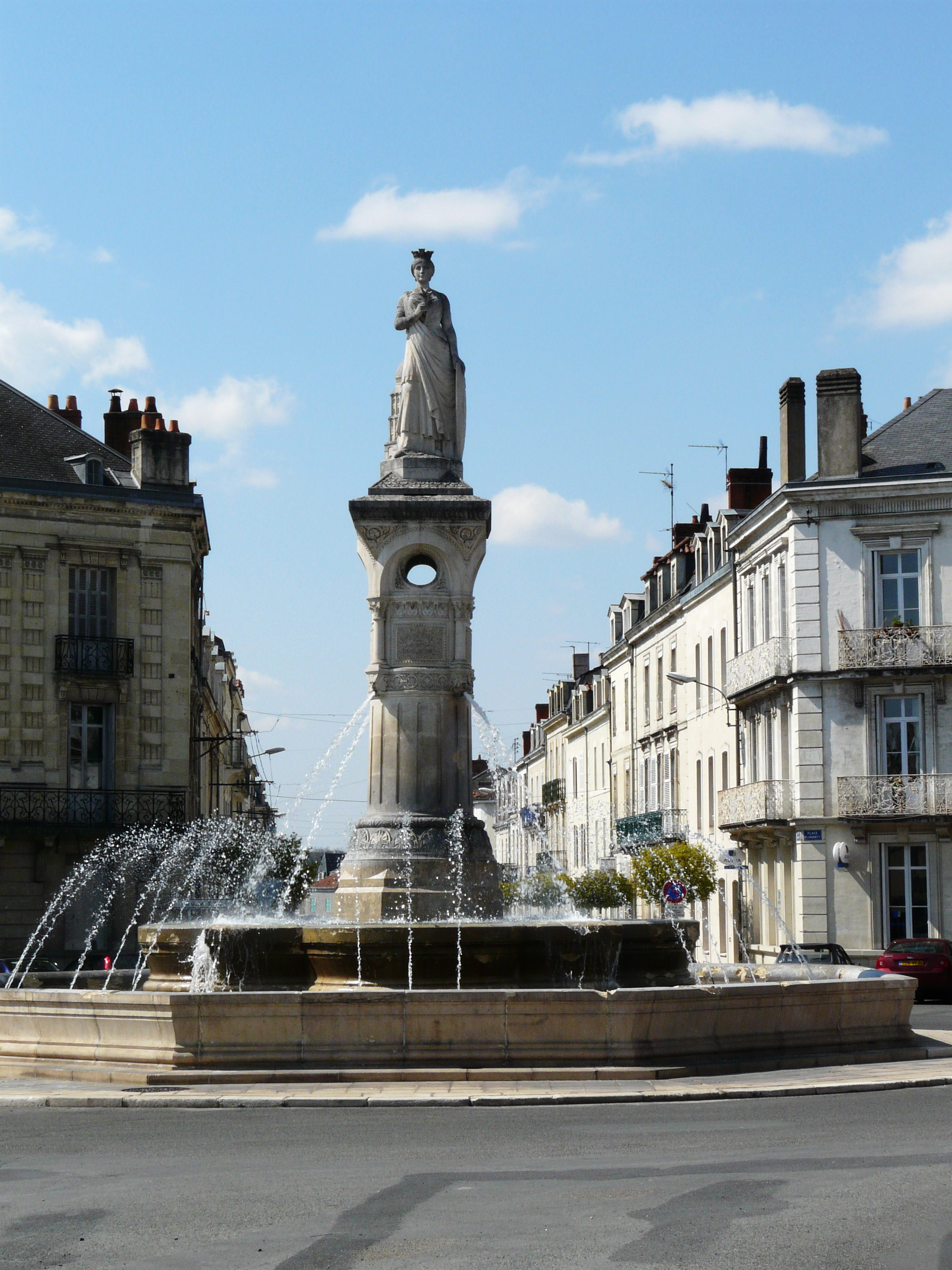 La fontaine de la place Plumancy, Périgueux, Dordogne, France.